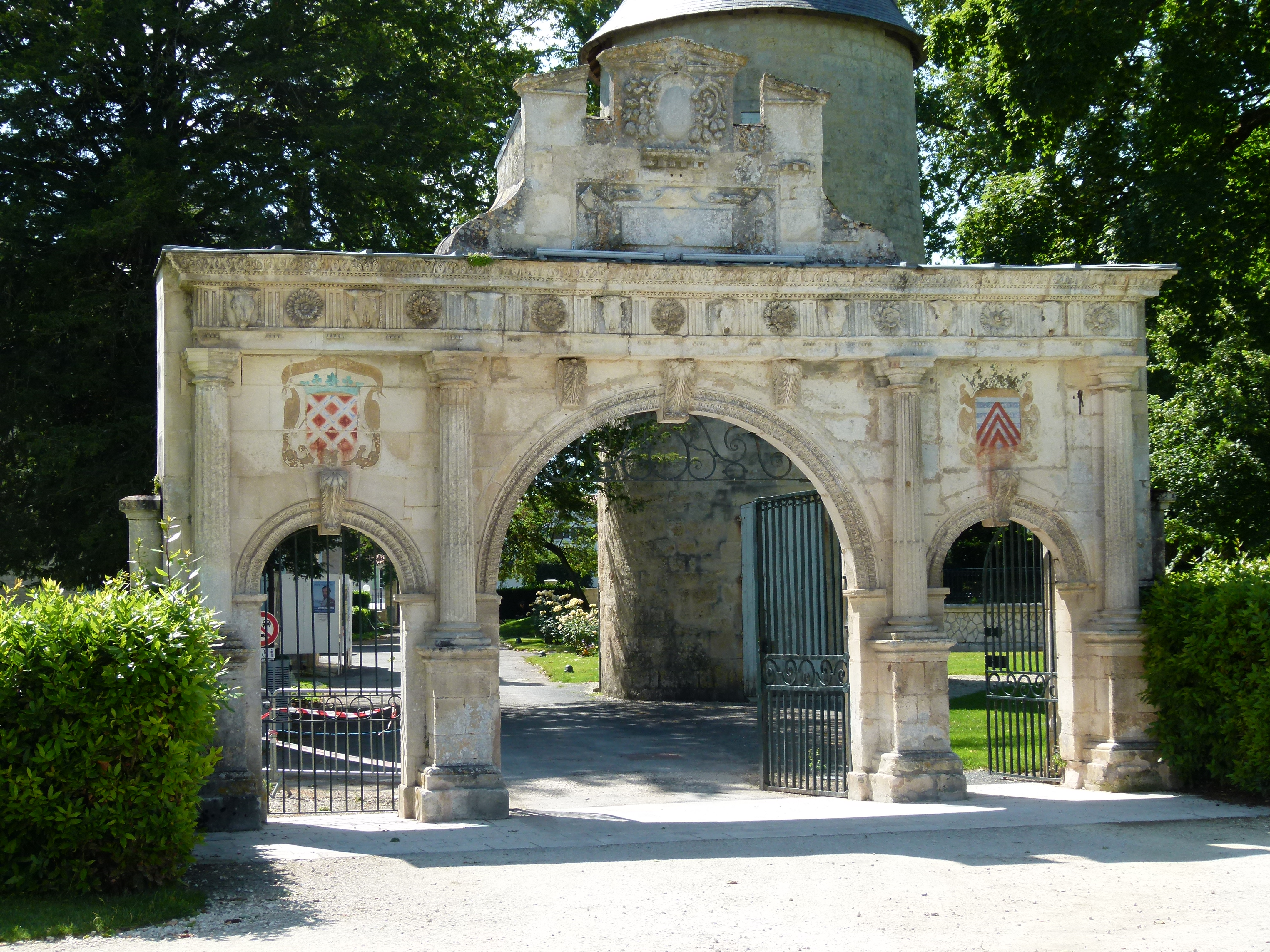 La Porte Renaissance donne accès au château qui abrite la mairie de Surgères et à la Tour Hélène.